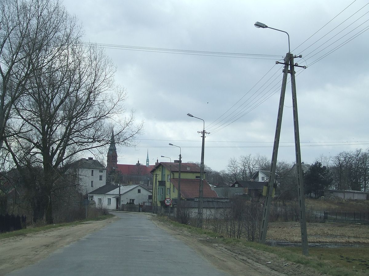 Nasielsk skyline, Poland